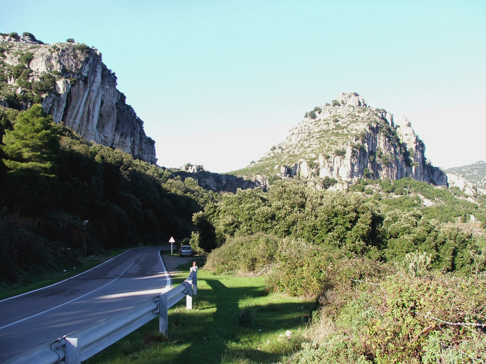 Tacchi